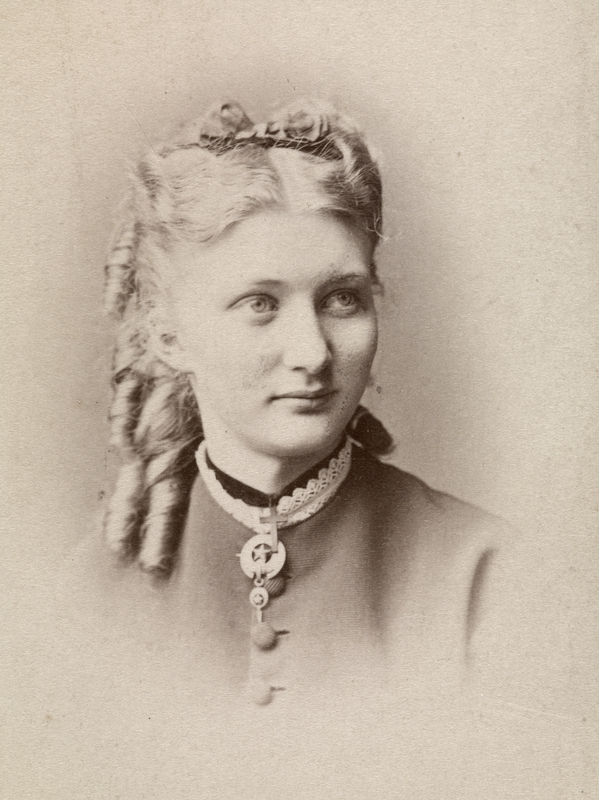 Portrett av Andrea Gram, portrett, kvinne, vignettert brystbilde.